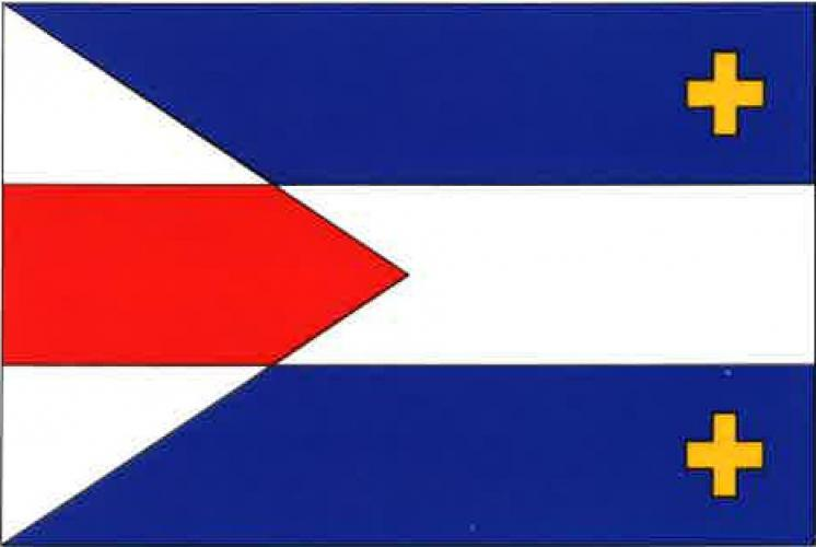 Vlajka, Tatrovice, okres sokolov